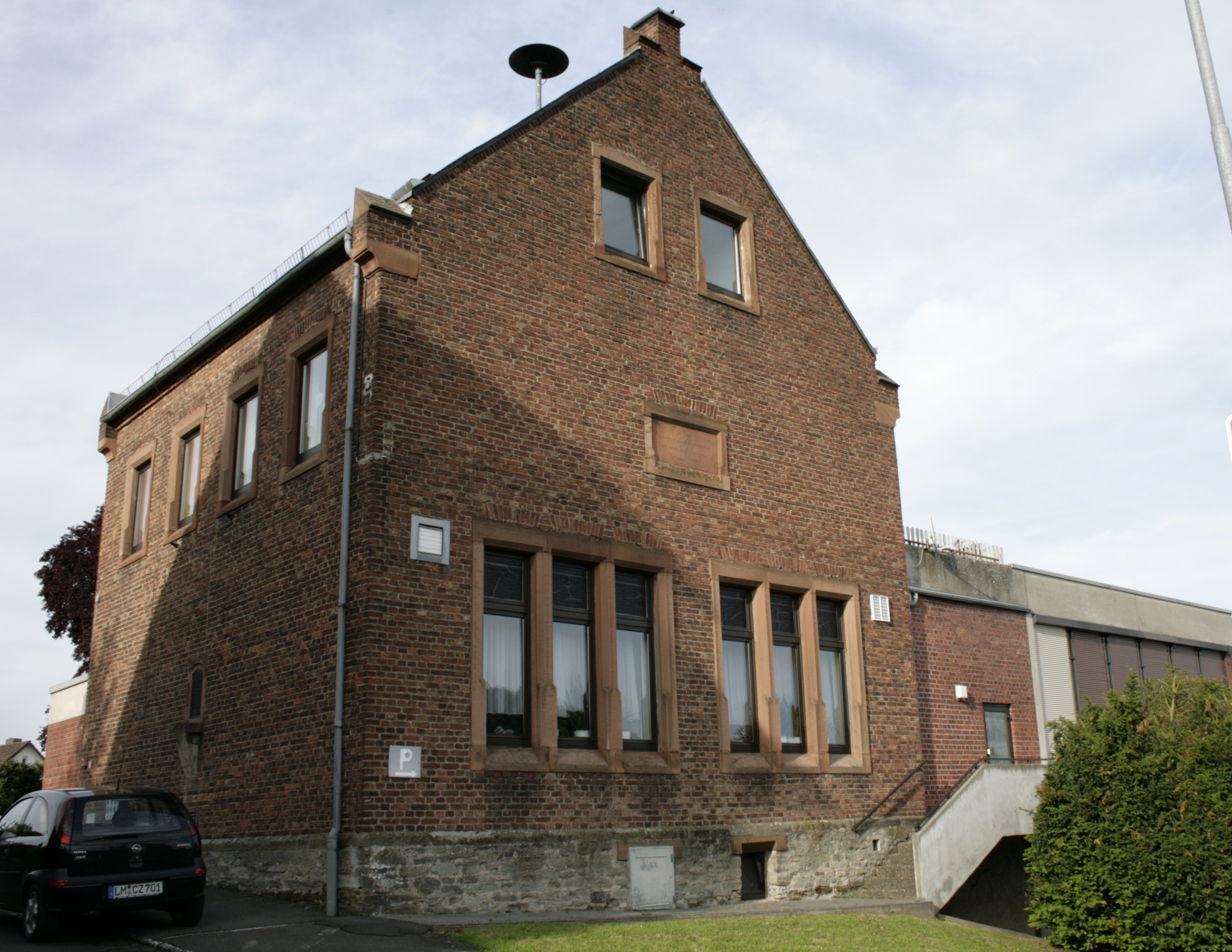 Gemeinschaftshaus in Falkenbach, Deutschland